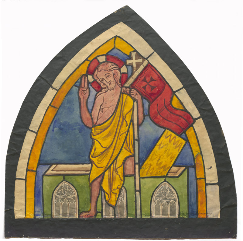 Kristi uppståndelse. Glasmålning i korets södra fönster. Akvarell av Gustava Meukow, från ca 1900. Motiv: Endre kyrka Kategori: (03) Glasmålningar, Akvarell Kristi uppståndelse. Glasmålning i korets södra fönster. Akvarell av Gustava Meukow, från ca 1900.